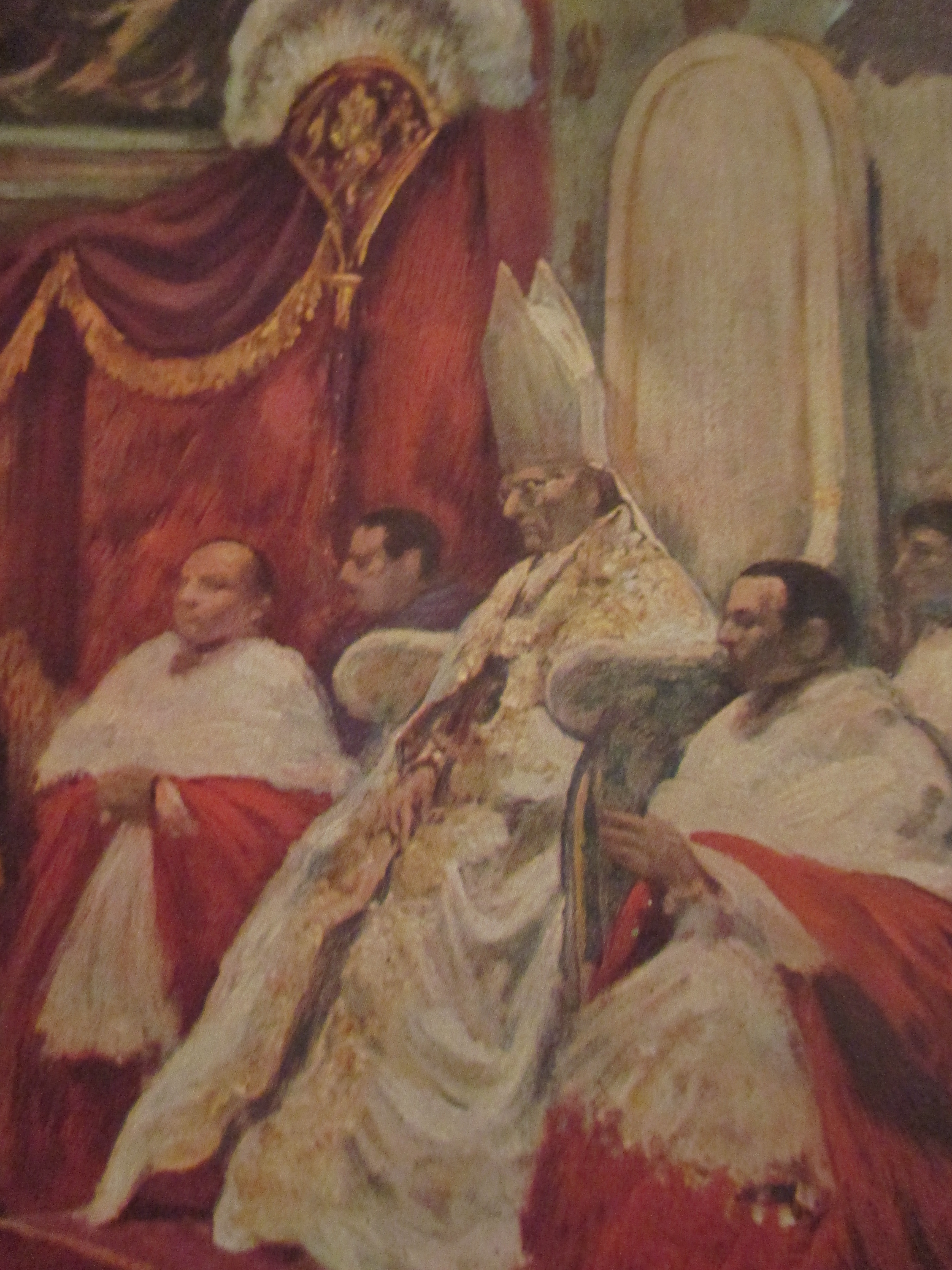 Pie XI: tableau de Serge Ivanoff, in L'Illustration, numéro hors série de février 1939 consacré à la mort du pape.